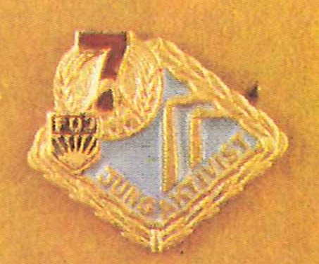 Jungaktivistenabzeichen 3. Form von 1959-1967